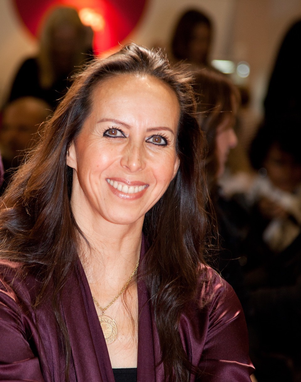 Stiftungsgründerin Isabelle Müller